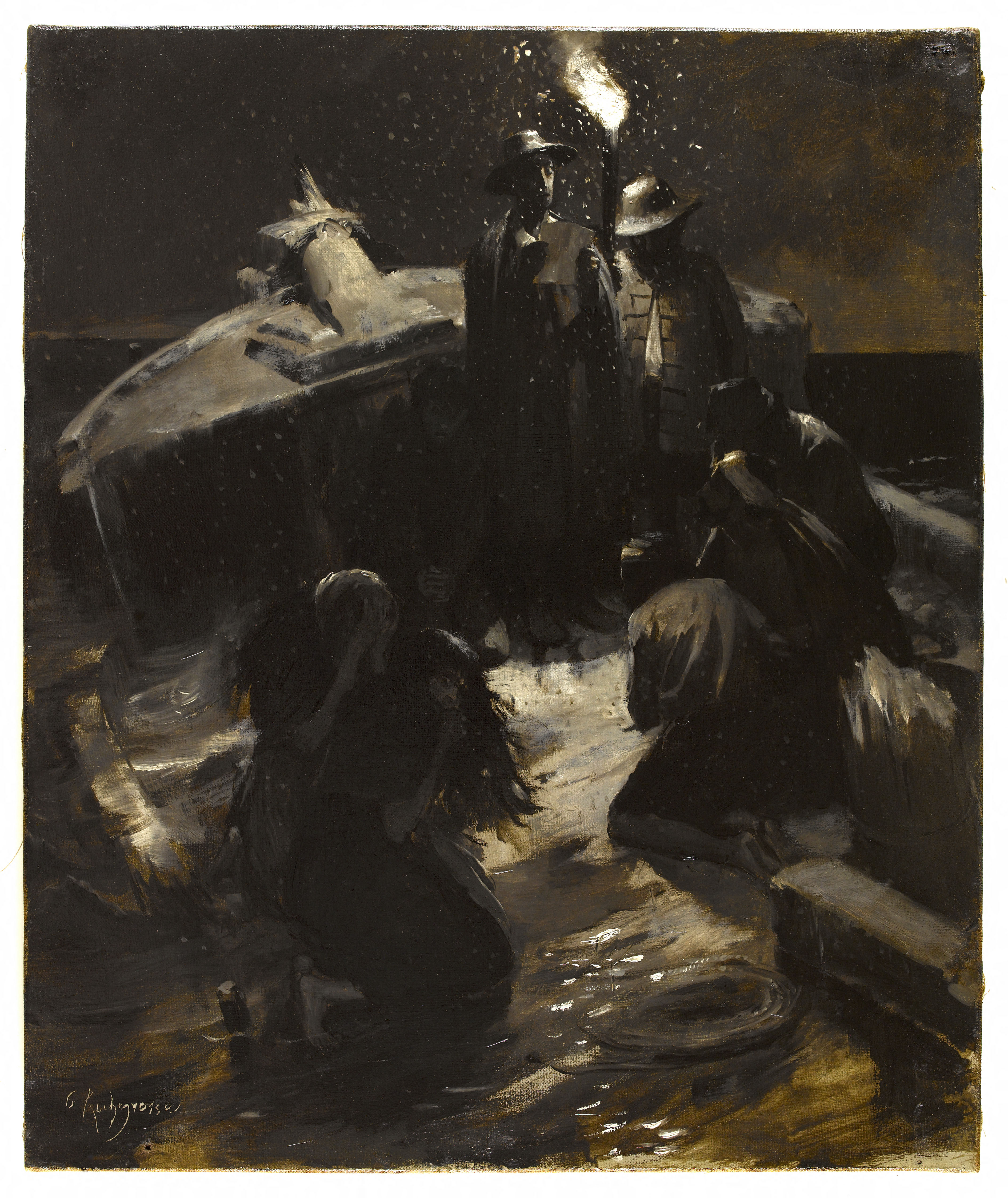 Sur l'épave de l'hourque la Matutina en train de couler, éclairé par une torche tenue par le voleur Ave-Maria, le docteur Geestemunde lit aux comprachicos contrits la confession manuscrite relative à l'enlèvement et la mutilation de Gwynplaine. Cette peinture à l'huile de Georges-Antoine Rochegrosse a servi de modèle à la gravure de Fortuné Méaulle reproduite en page 137 du roman de Victor Hugo, L'Homme qui rit, dans l'Édition Hugues (1886). L'illustration correspond au texte de la première partie, II, XVIII « La ressource suprême ».